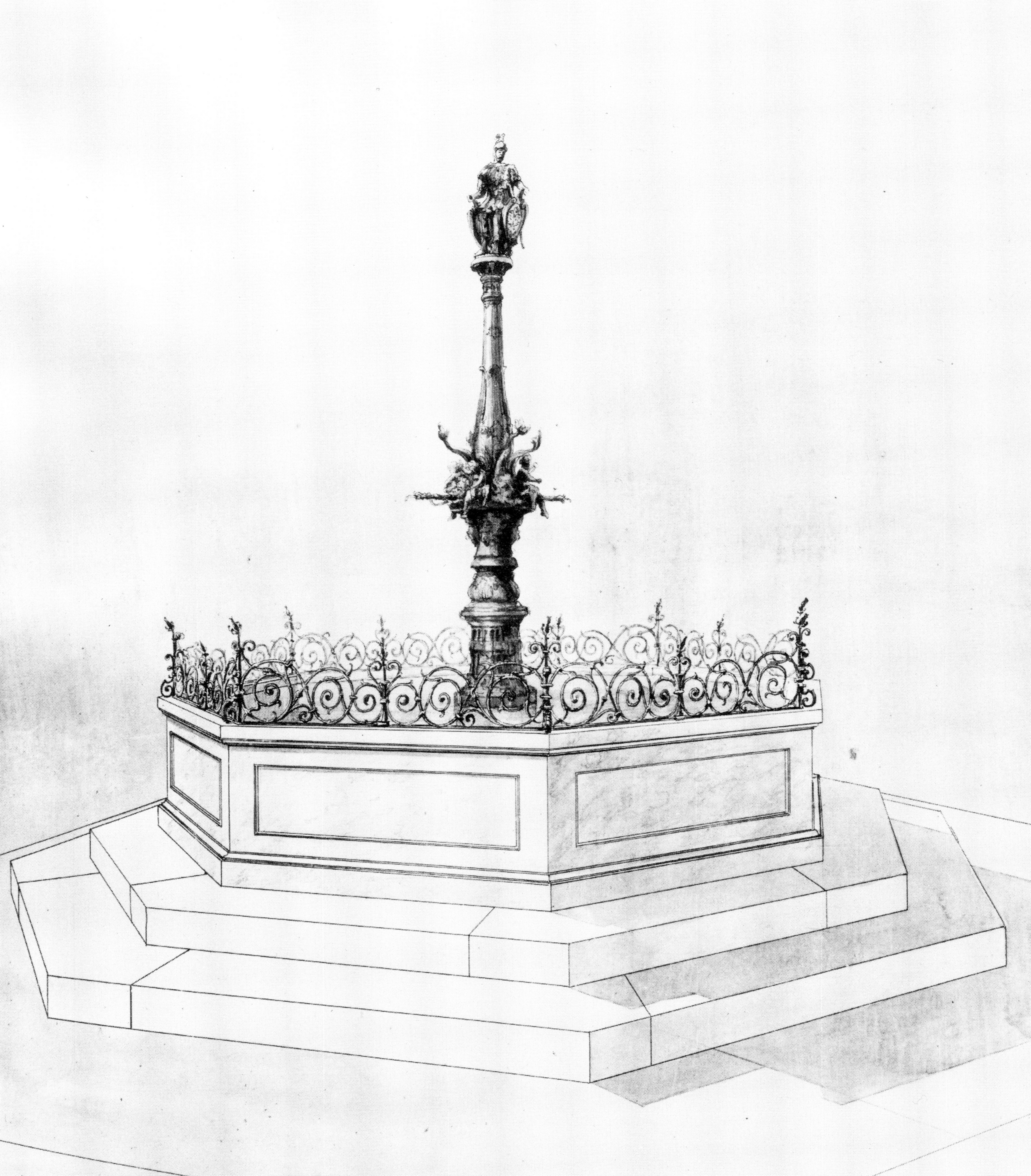 Rathausbrunnen Kempten, nicht ausgeführter Entwurf v. Adolf Leichtle mit geradwandigen Becken